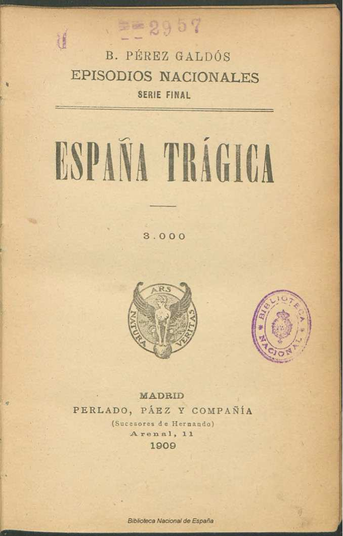 España trágica Autor: Pérez Galdós, Benito (1843-1920) Fecha: 1909 Datos de edición: Madrid, Perlado, Páez y Compañía (Sucesores de Hernando)